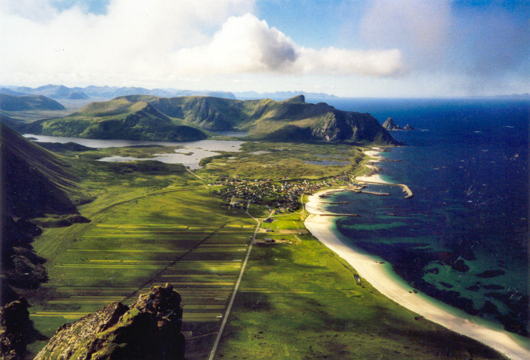 Bleik, Andøy, in the county of Nordland, Norway Photo: Inge Bakke, Selje. 1999